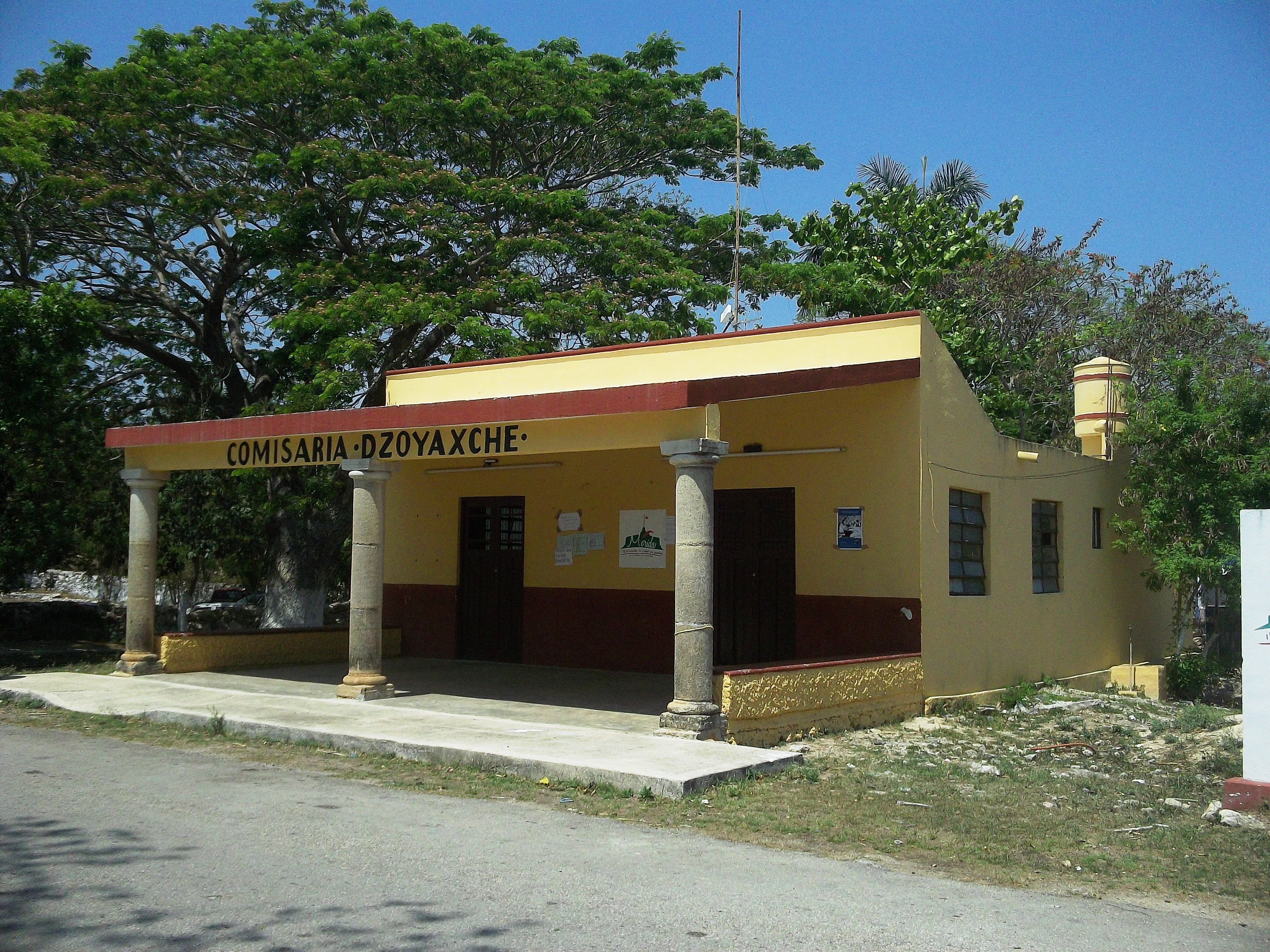 Casda comisarial de Dzoyaxché (Mérida), Yucatán.